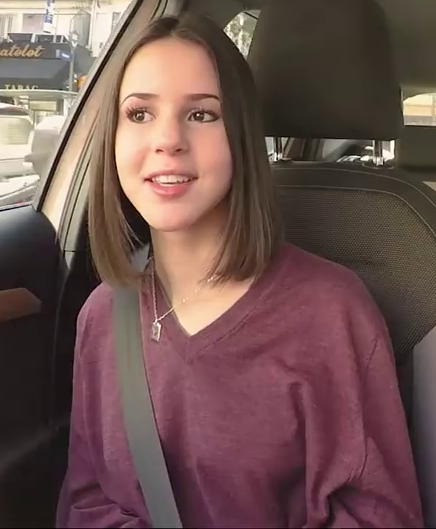 Marina Kaye